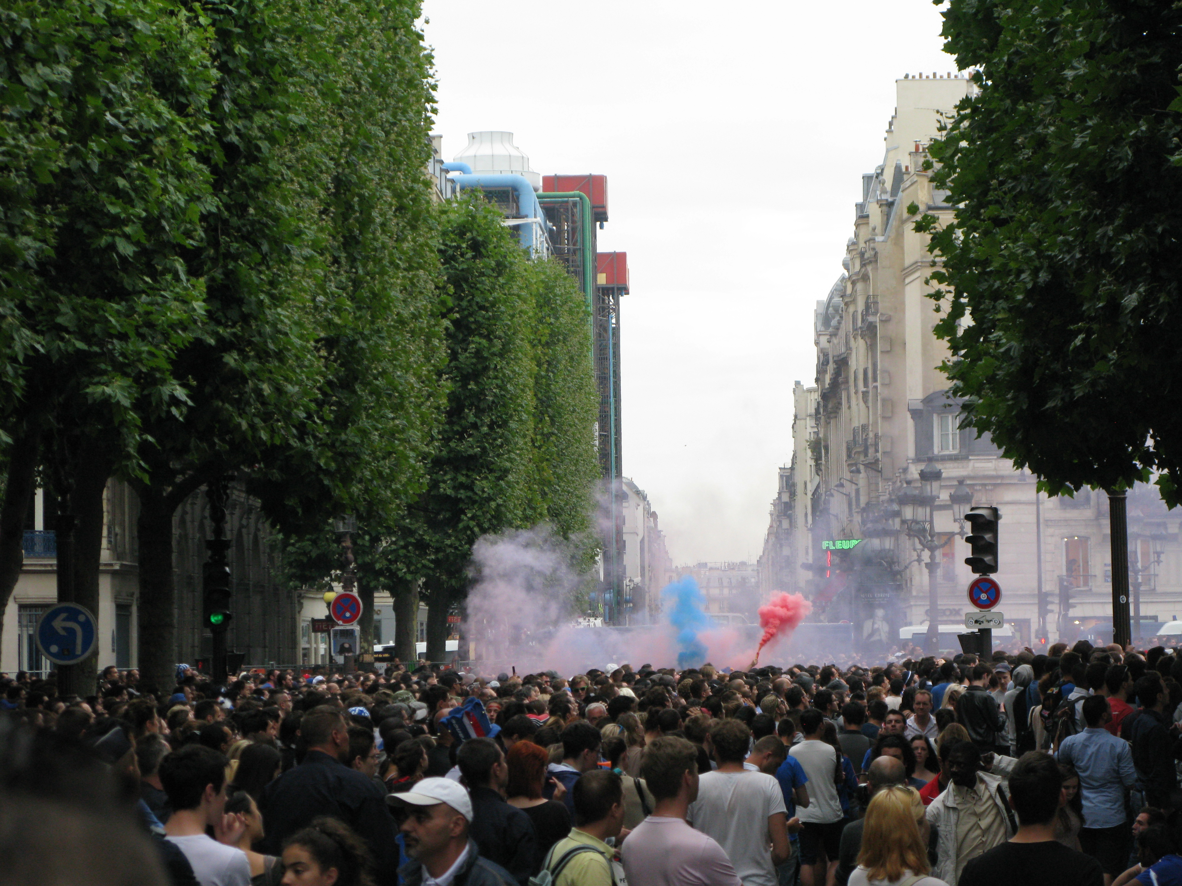 France - Allemagne lors de la Coupe de monde 2014, parvis de l'Hôtel de Ville de Paris.